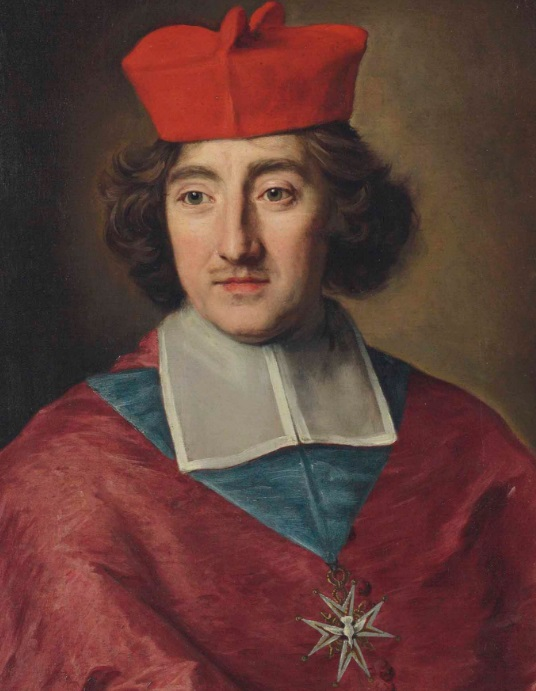 by jacob Voet